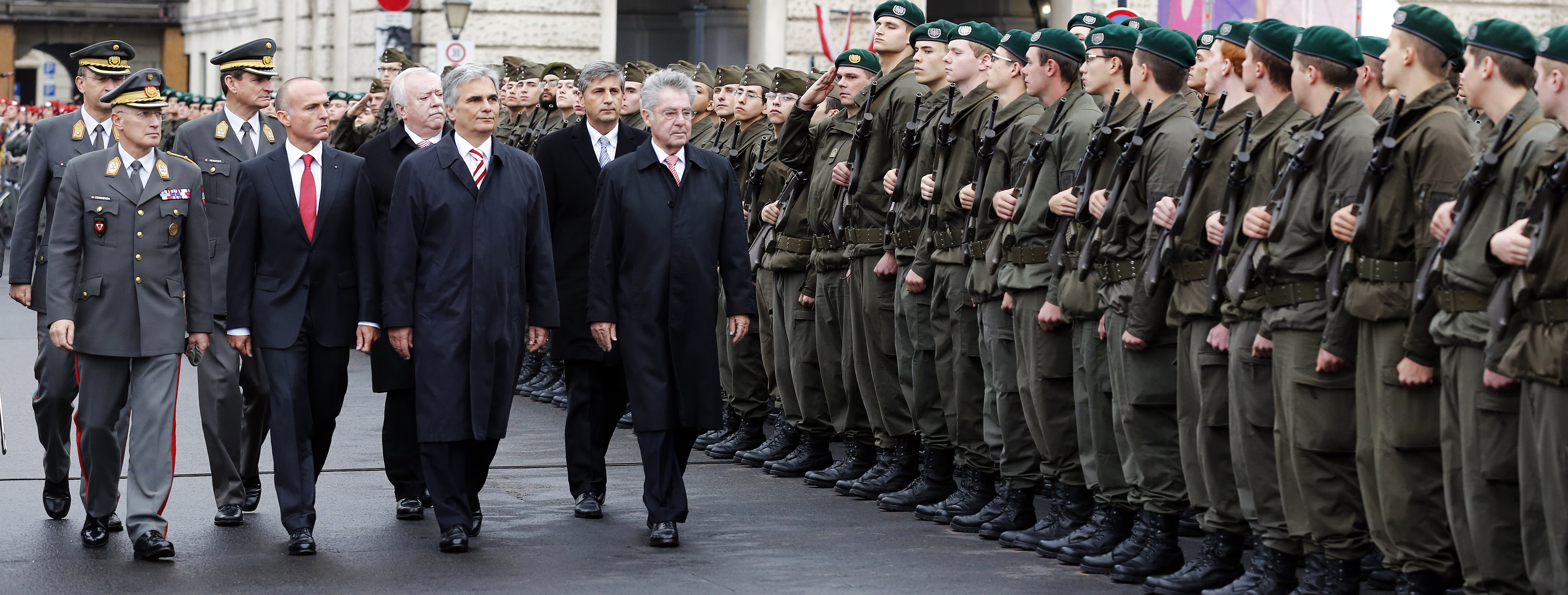 Nationalfeiertag, Heldenplatz, Wien, 26.10.2013, Foto: Dragan Tatic